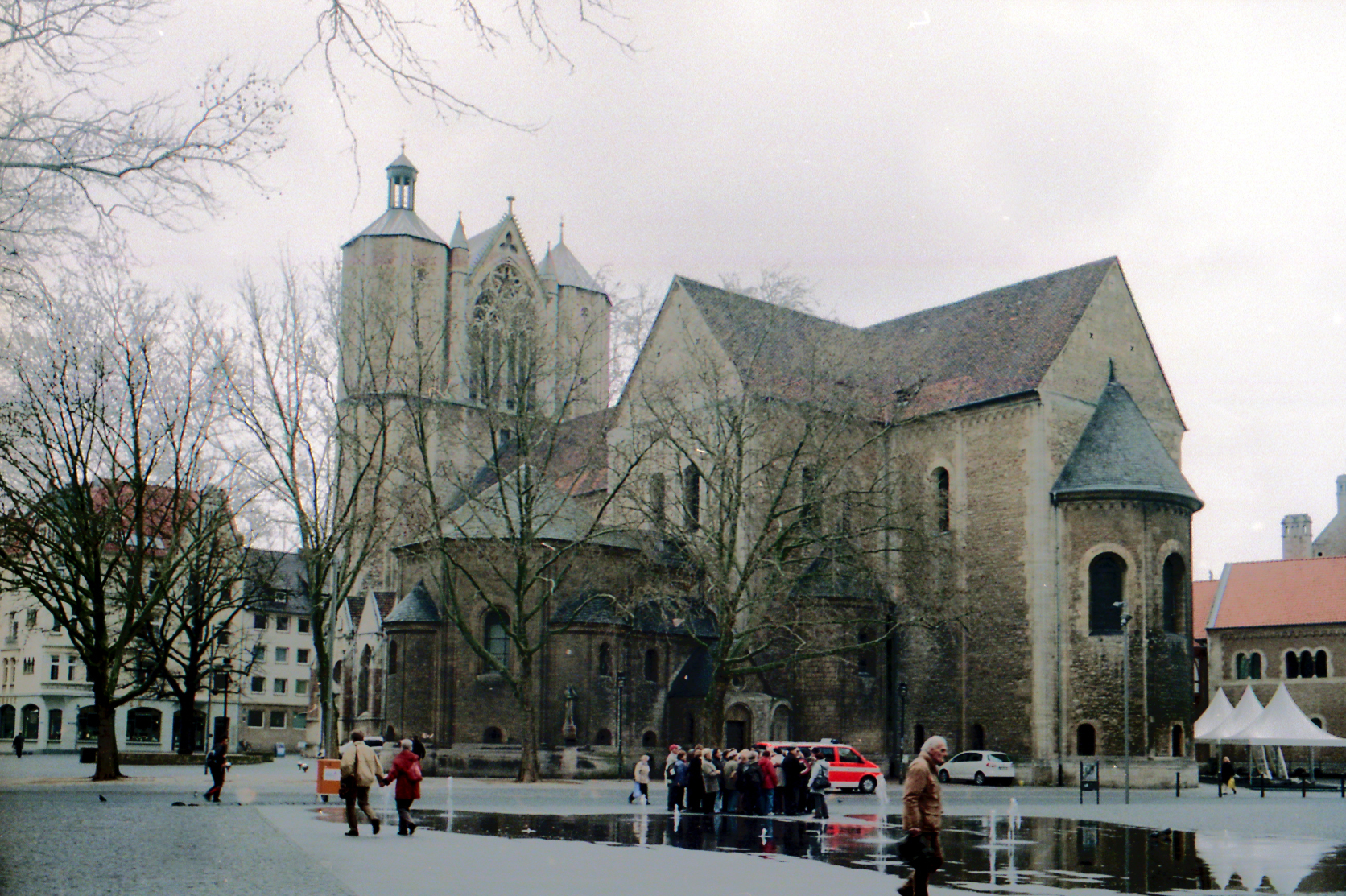 Вид башен собора Св.Власия